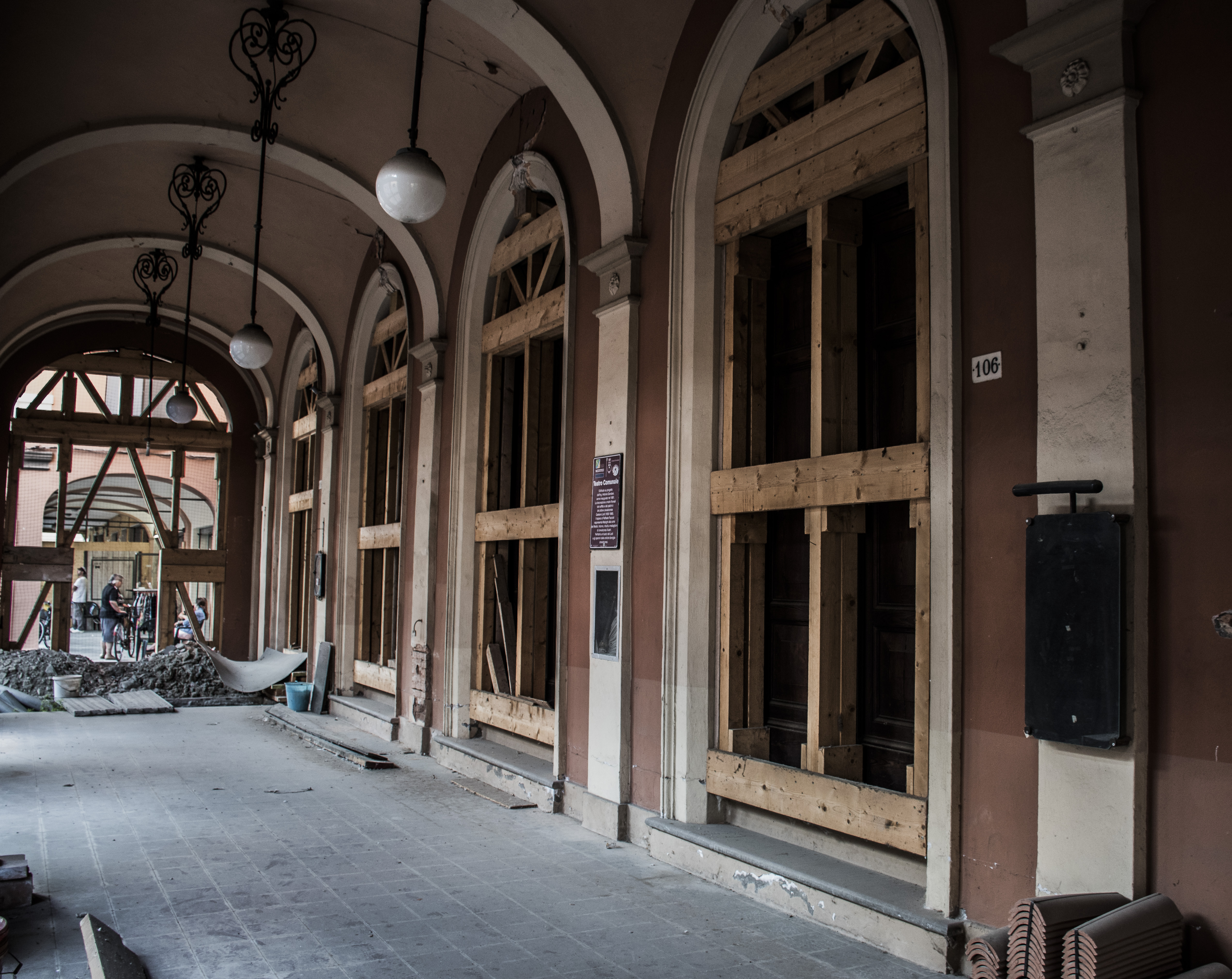 Teatro Comunale This is a photo of a monument which is part of cultural heritage of Italy.